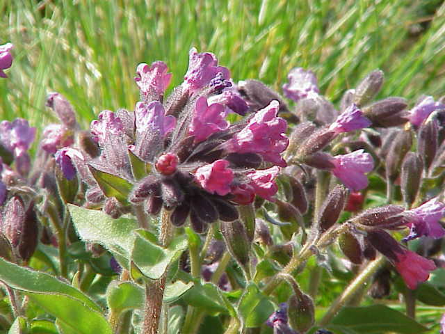 Species: Pulmonaria montana Family: Boraginaceae Image No. 1